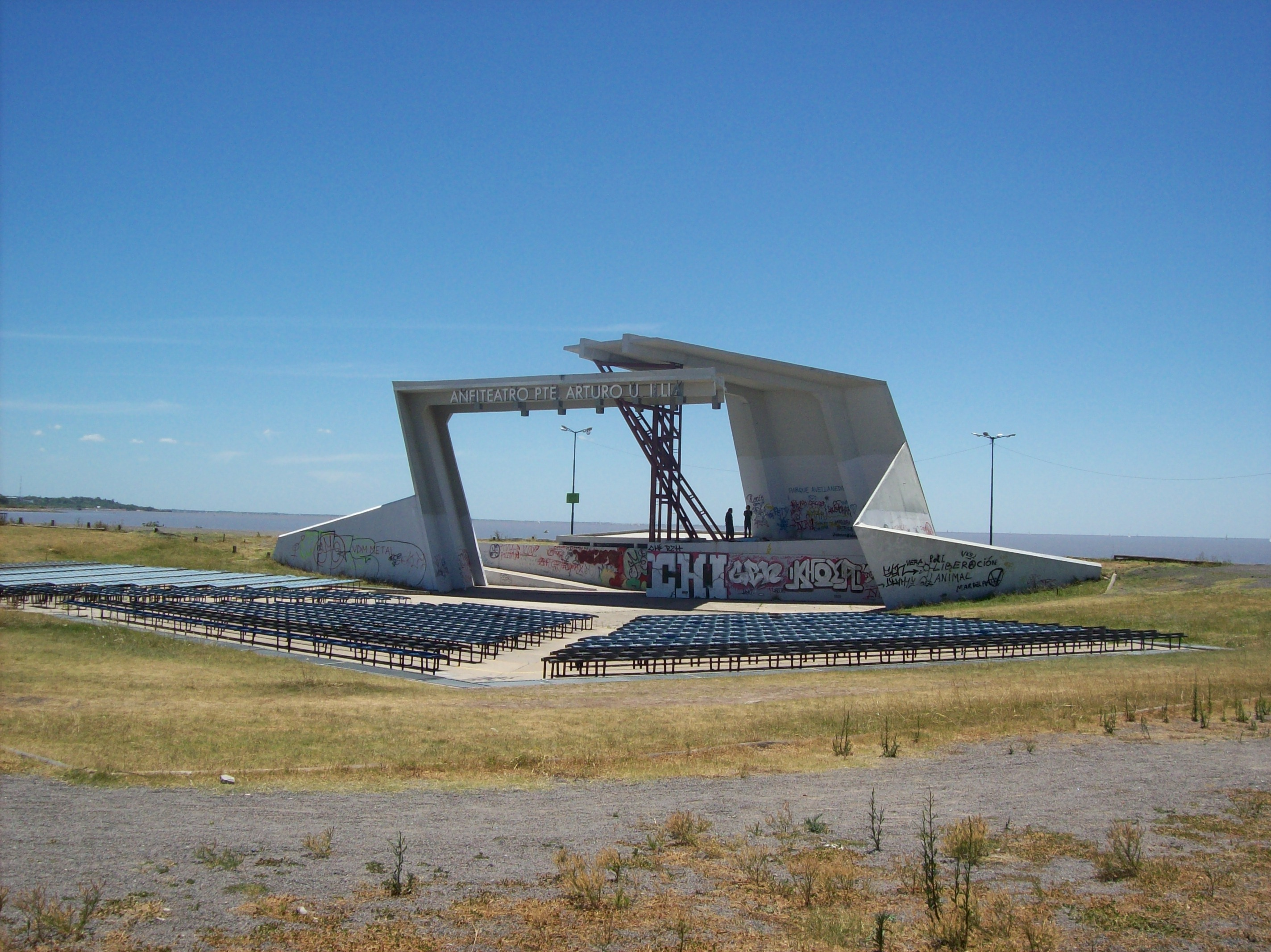 Anfiteatro Arturo Umberto Illia junto al Río de la Plata en Vicente López, Provincia de Buenos Aires, Argentina.